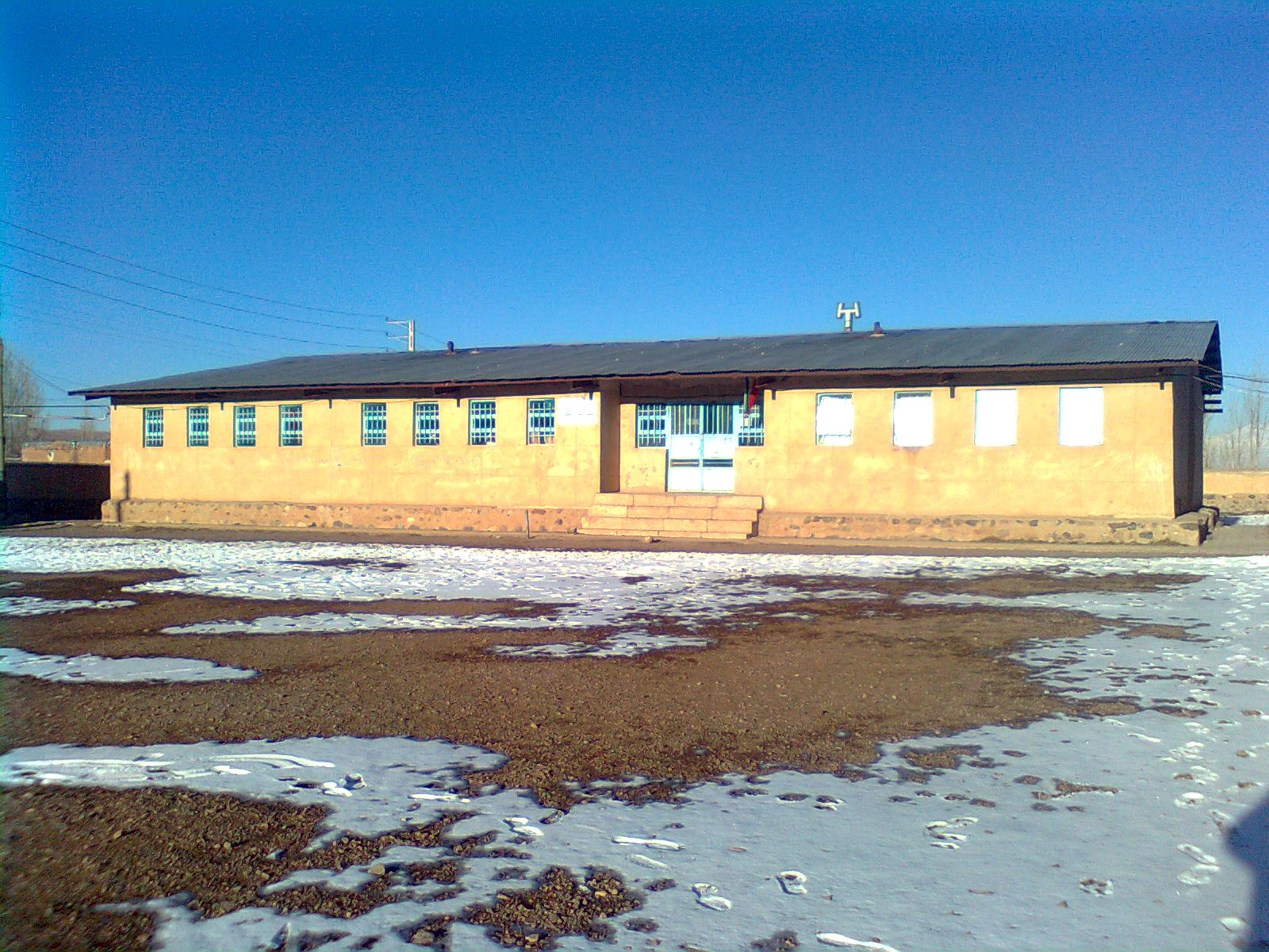 ساختمان قدیمی مدرسه روستای دانباران که برای تحصیل پسران از پایه یکم تا نهم به ارائه خدمات آموزشی میپردازد.